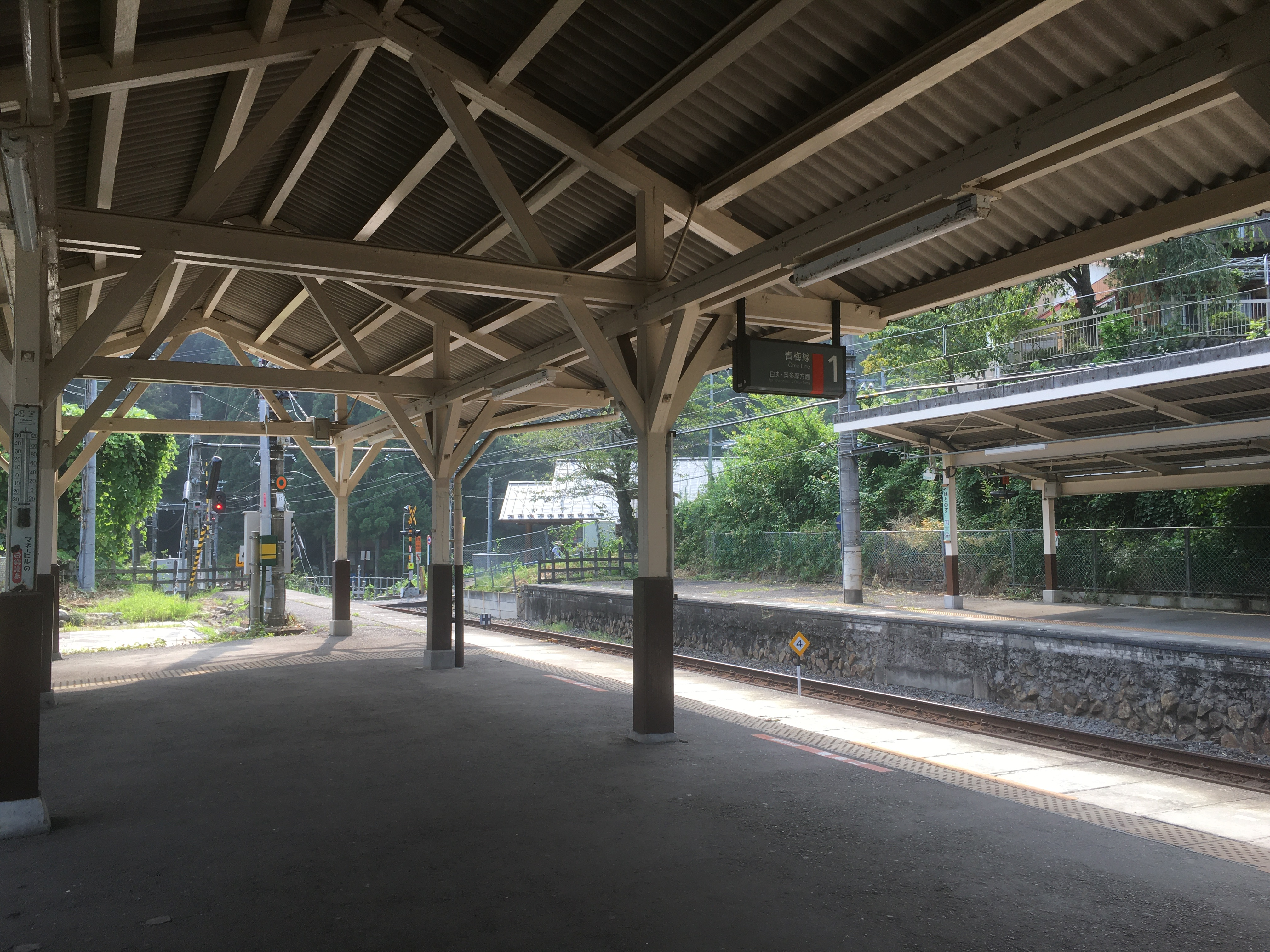 鳩ノ巣駅 (Hatonosu Station)